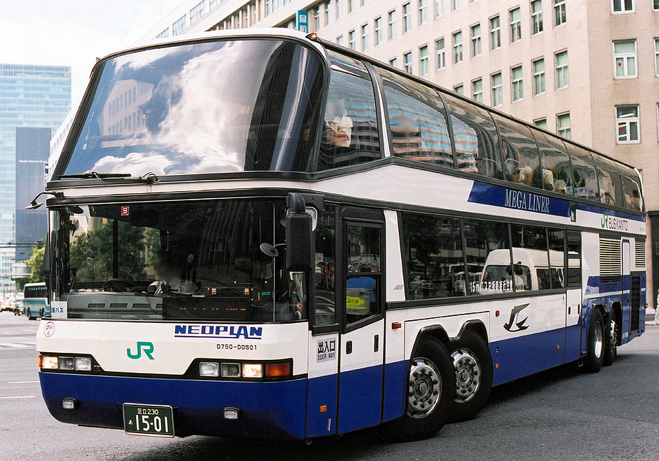 JRバス関東 ネオプランメガライナー D750-00501